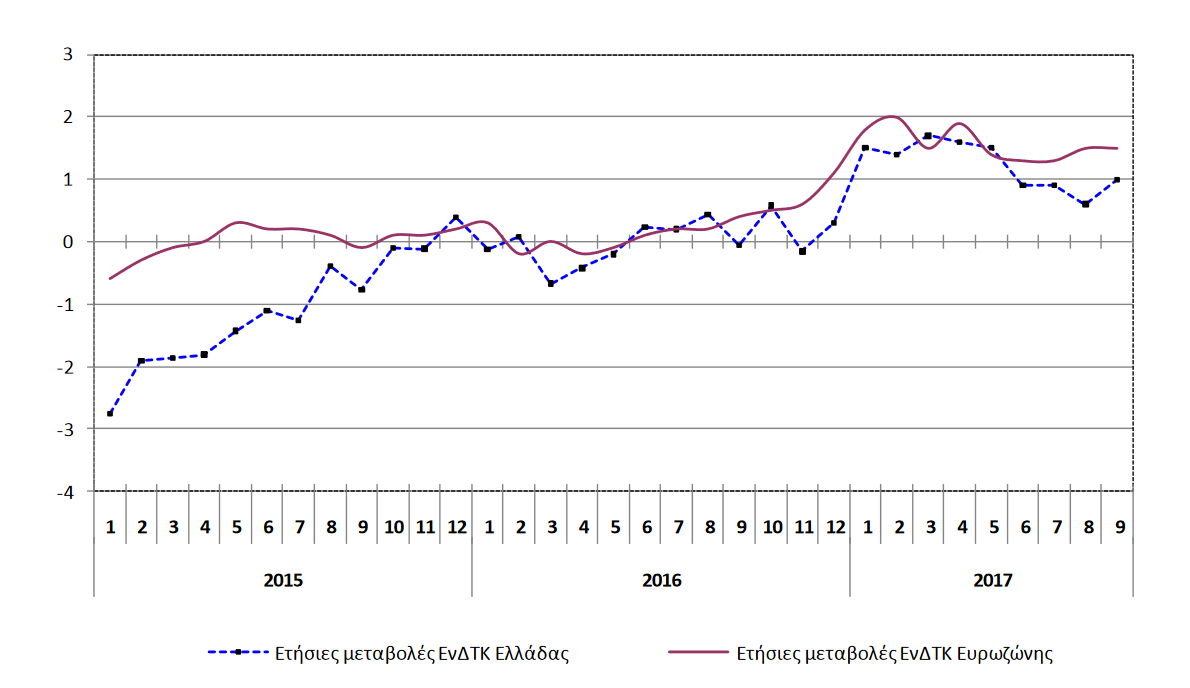 Ετήσιες μεταβολές (%) ΕνΔΤΚ Ελλάδας και ΕνΔΤΚ Ευρωζώνης. Πηγή ΕΛΣΤΑΤ